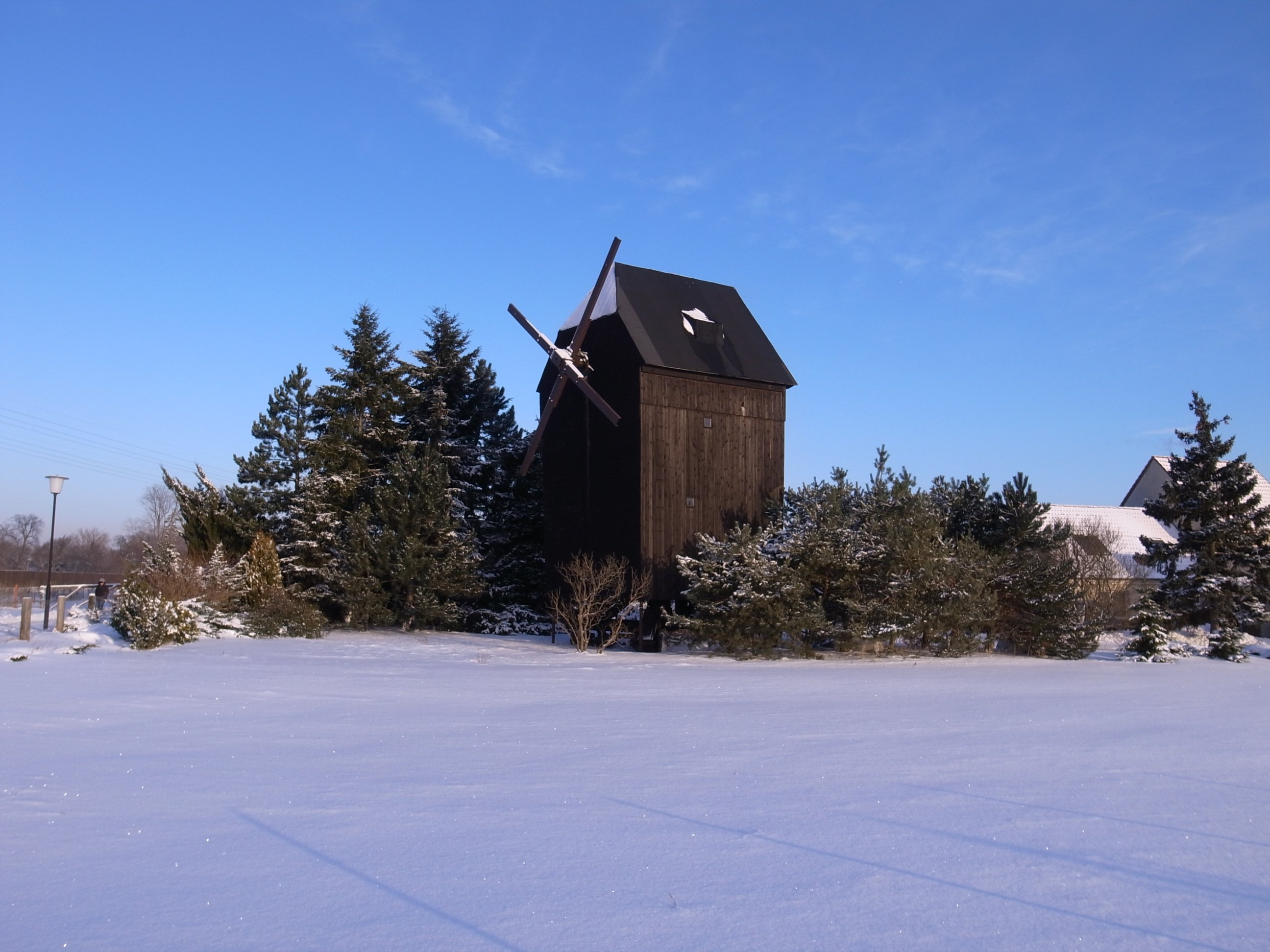 Gräfenhainichen,Preußer'sche Bockwindmühle